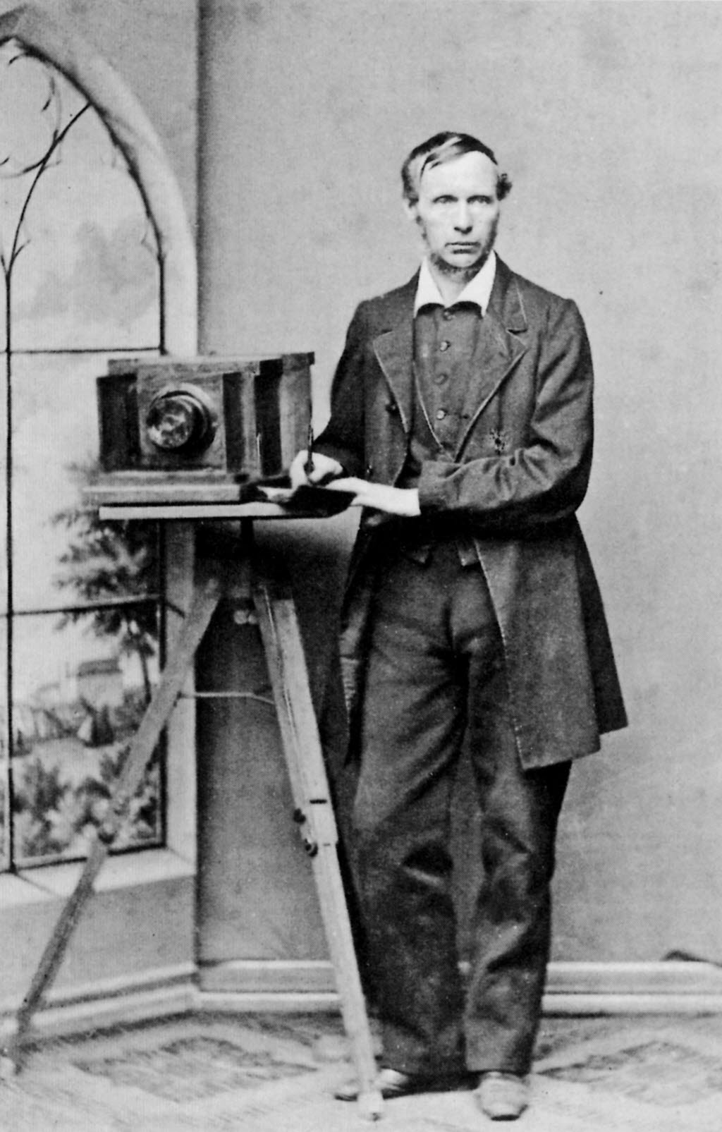 in seinem Atelier, Selbstbildnis.